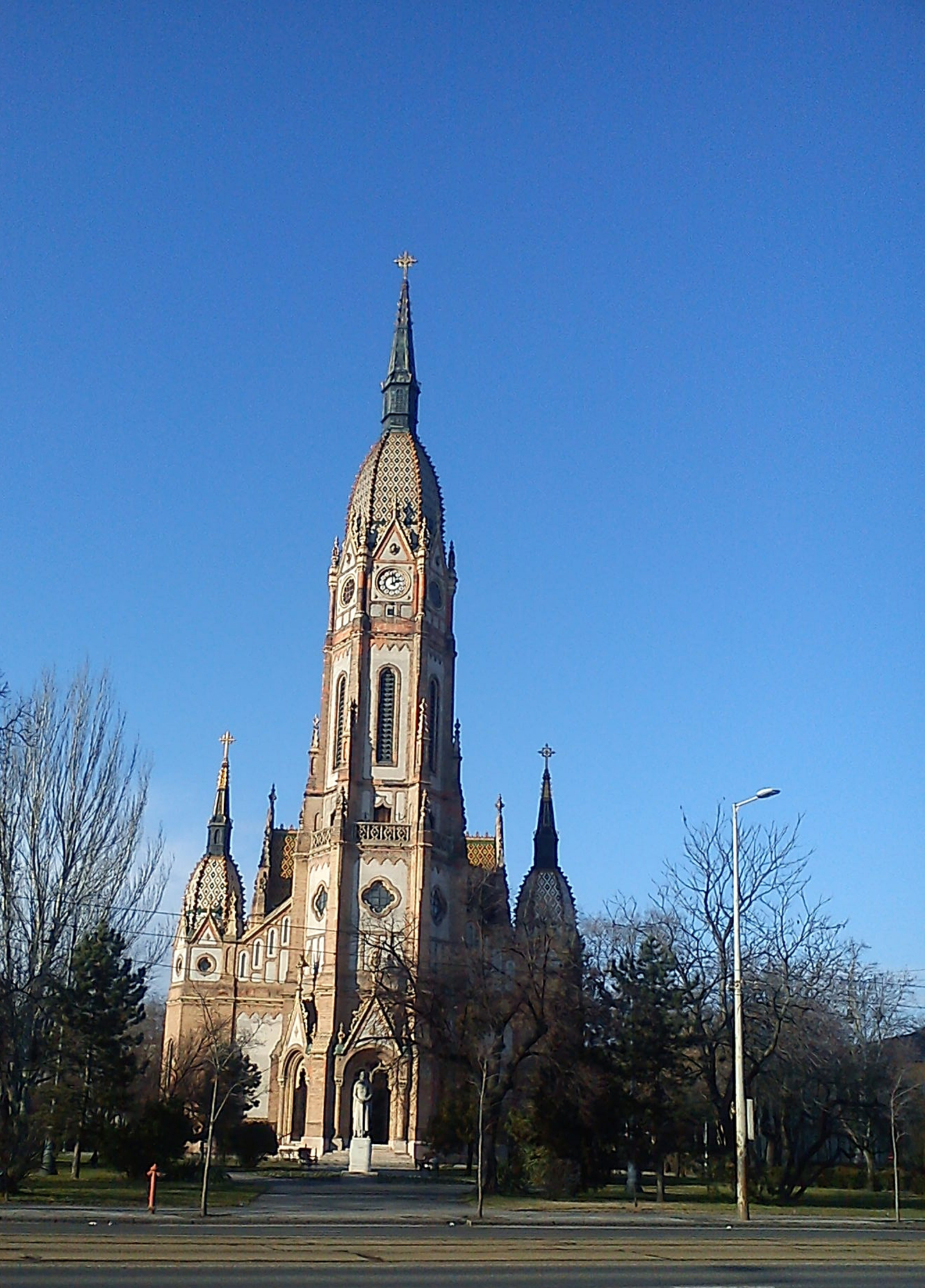 Szent László-templom, Kőbánya (Budapest, X.)